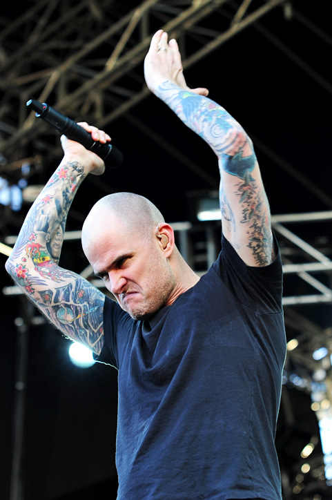 Al Barr No Sleep Til Festival 2010